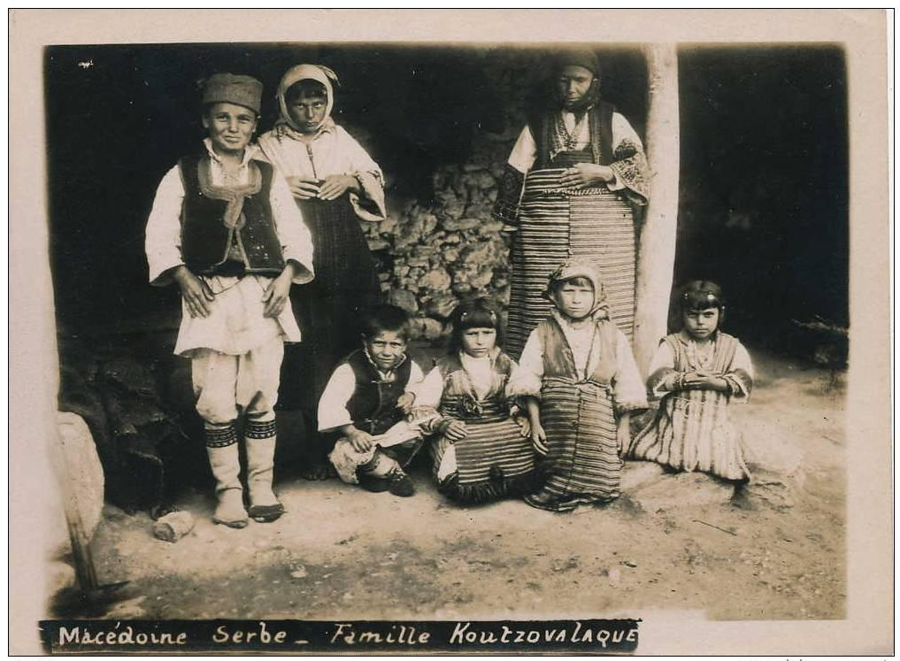 Влашко семейство в Македония през Първата световна война.